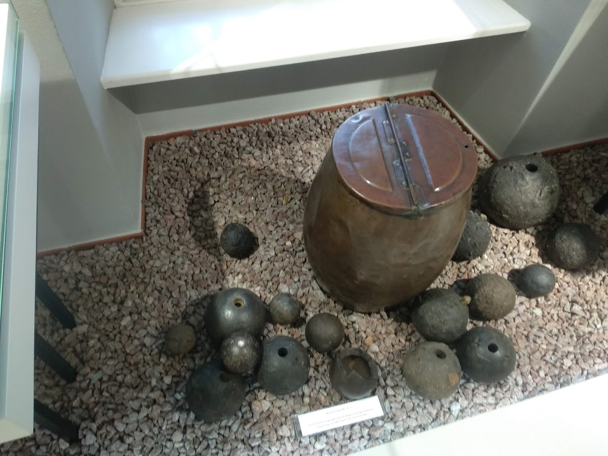 Muzeum Historii Włocławka (2019 r.)